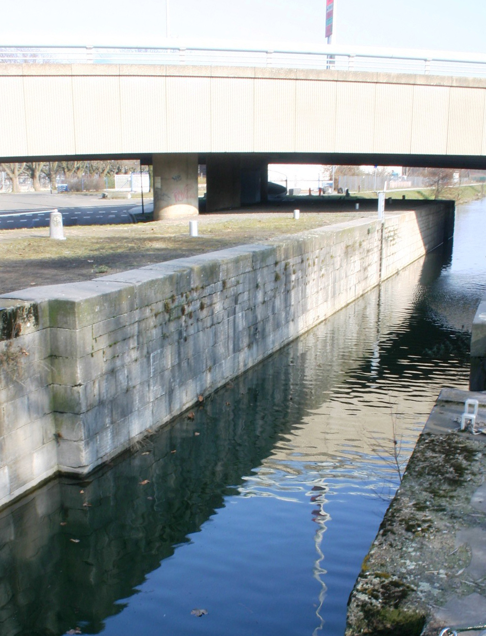 Schleis 2 Vue an d'Schleis